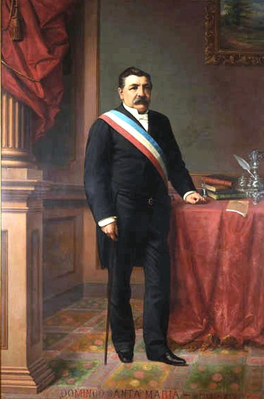 Esta obra fue realizada por el pintor y retratista italiano Bartolomé Pagani, durante el mandato del Presidente Domingo Santa María. La obra fue traspasada al Museo Histórico Nacional desde la Casa Nacional del Niño en 1980.